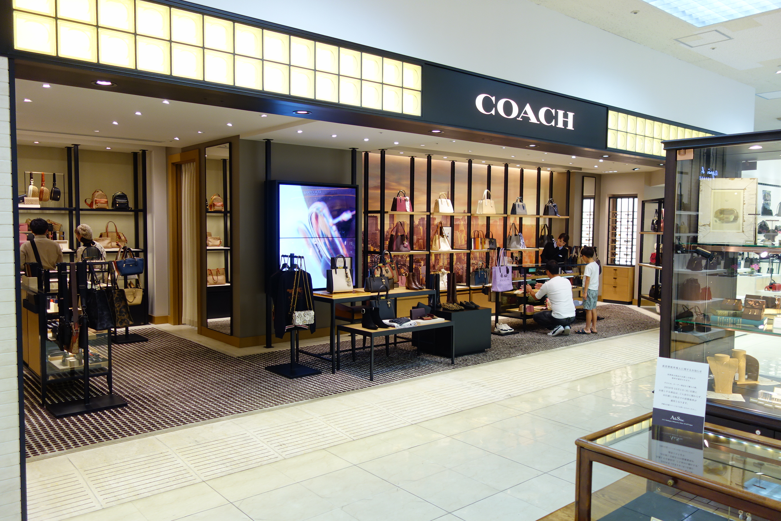 天満屋福山屋 一階ブランド街 Coachのテナント